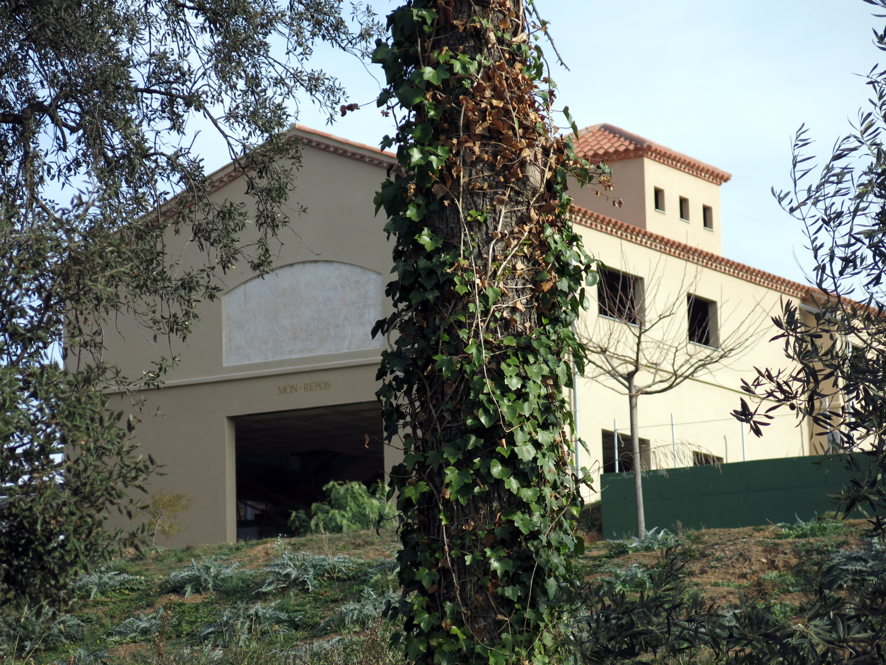 Mon Repòs (Terrassa)